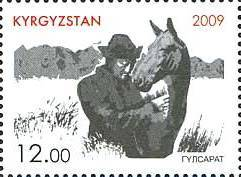 «Chyngyz Aitmatov and his arts» 577-584, number by Kyrgyz catalogue